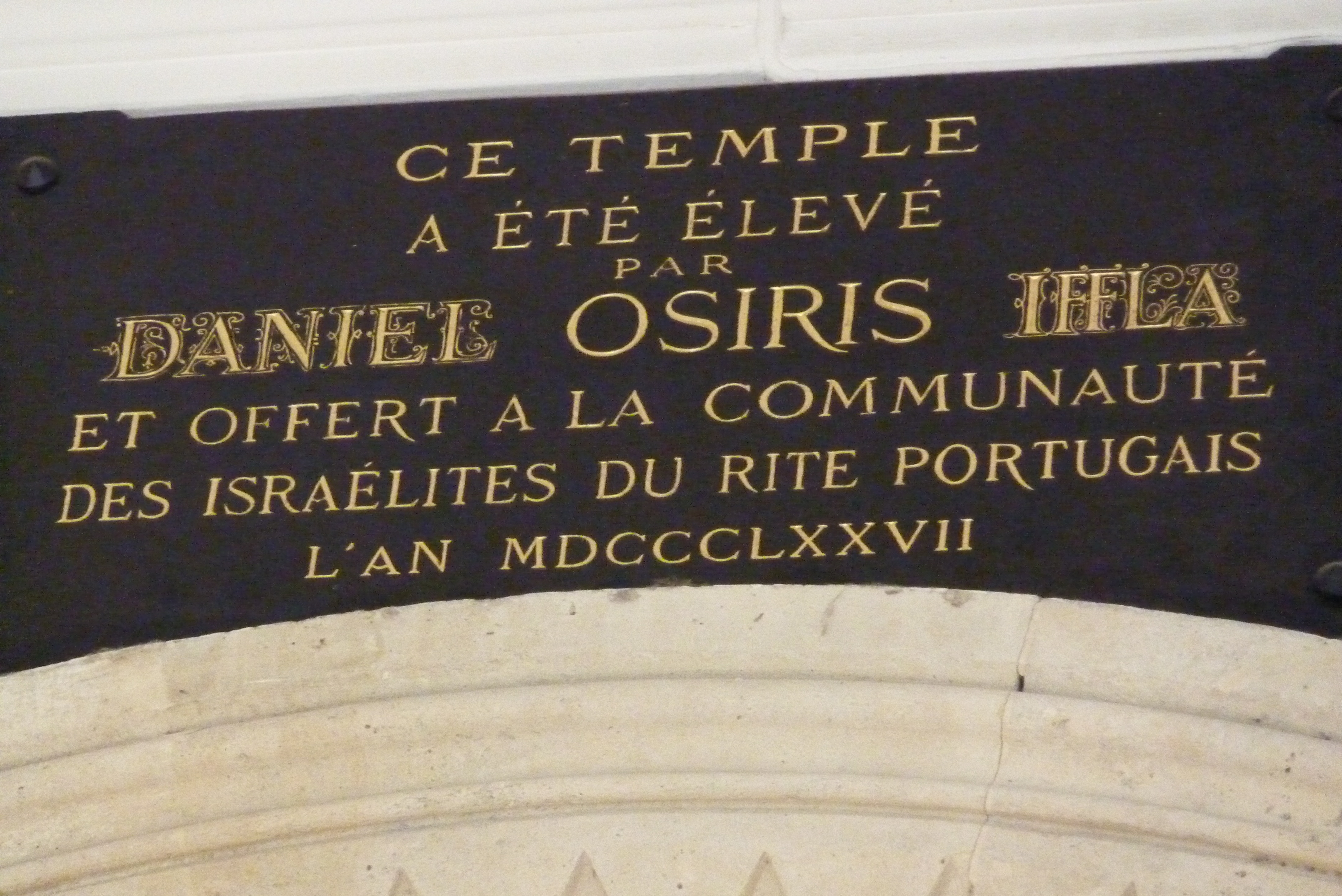 Gedenktafel Ce Temple a été élevé par Daniel Osiris Iffla et offert à la communauté des Israélites du rite portugais l'an MDCCLXXVII (1877)